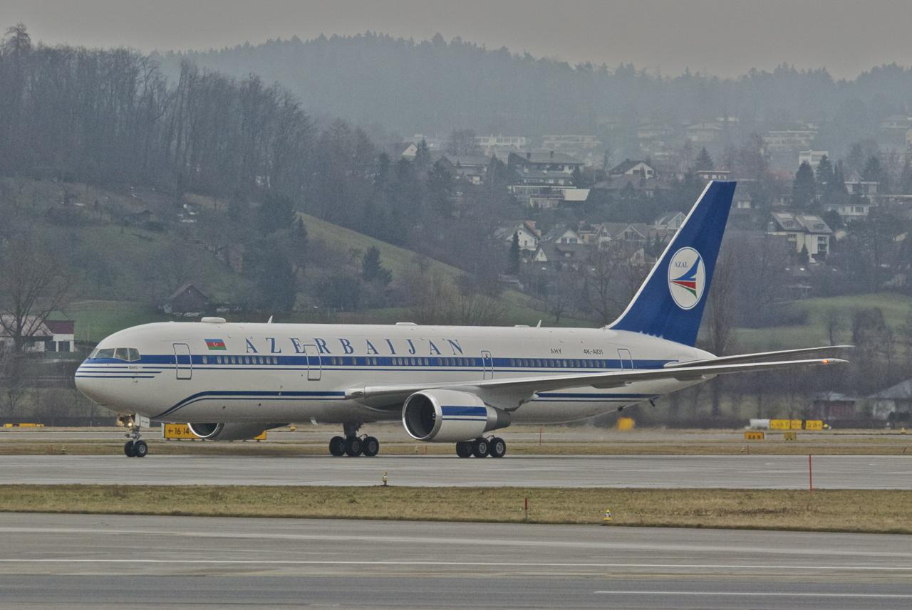 Azerbaijan Airlines Boeing 767-300; 4K-AZ01@ZRH;25.01.2012/637al637ai